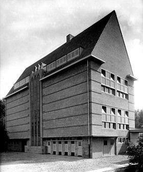 Het theoriegebouw van de Ambachtschool na de opening in 1931.